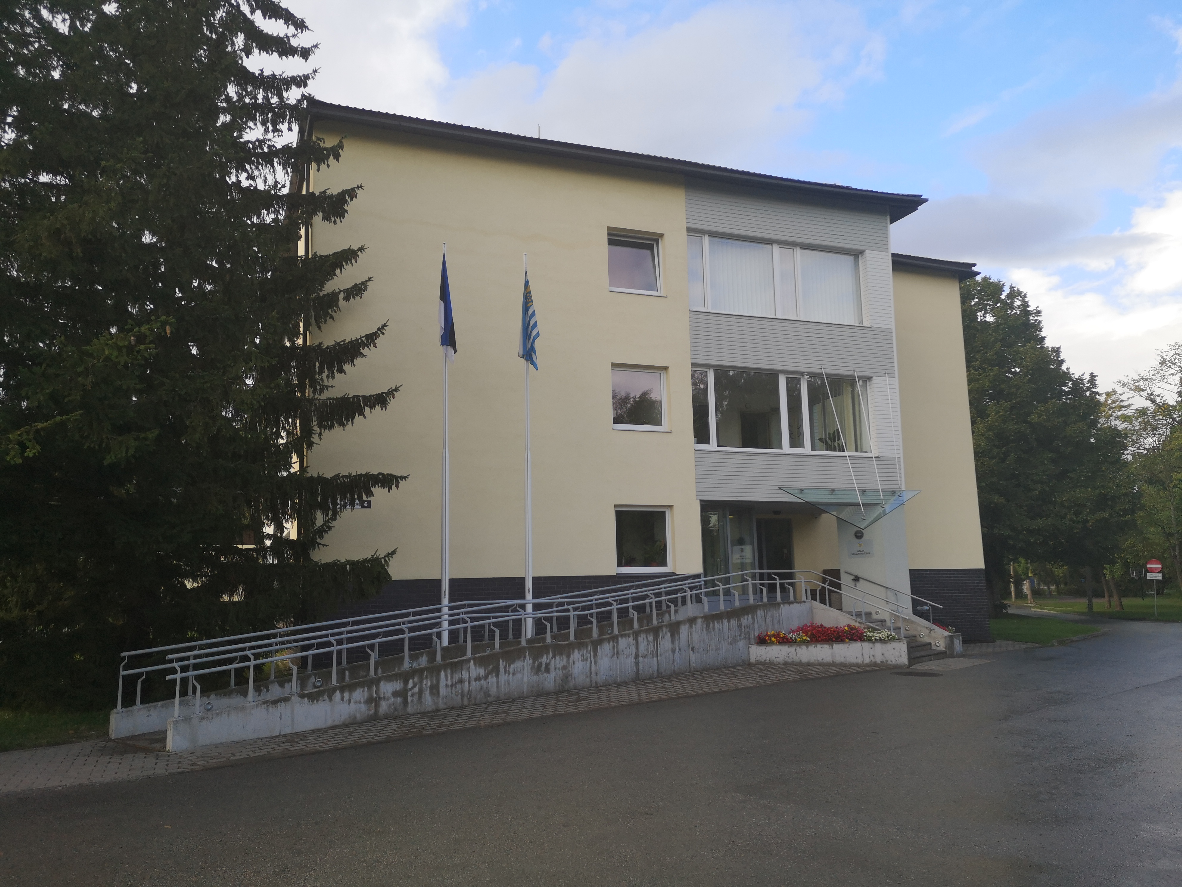 Anija vallavalitsus Friedrich Reinhold Kreutzwaldi 6, Kehra